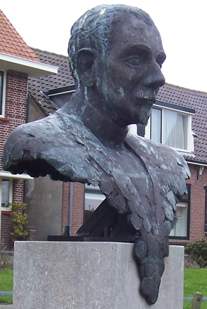 Borstbeeld Tjeerd Bottema, Voorstraat Katwijk aan Zee